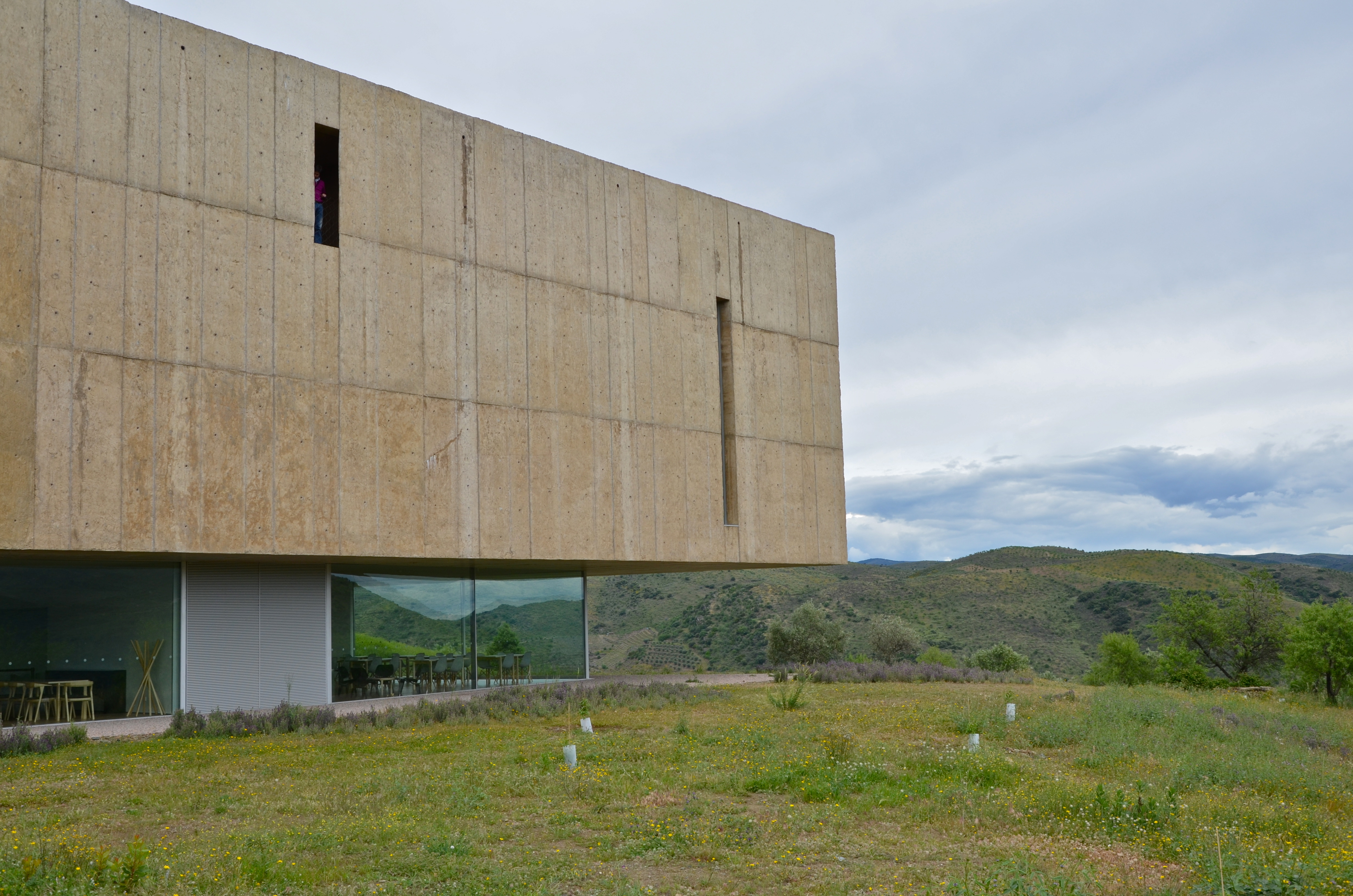 Museu 2